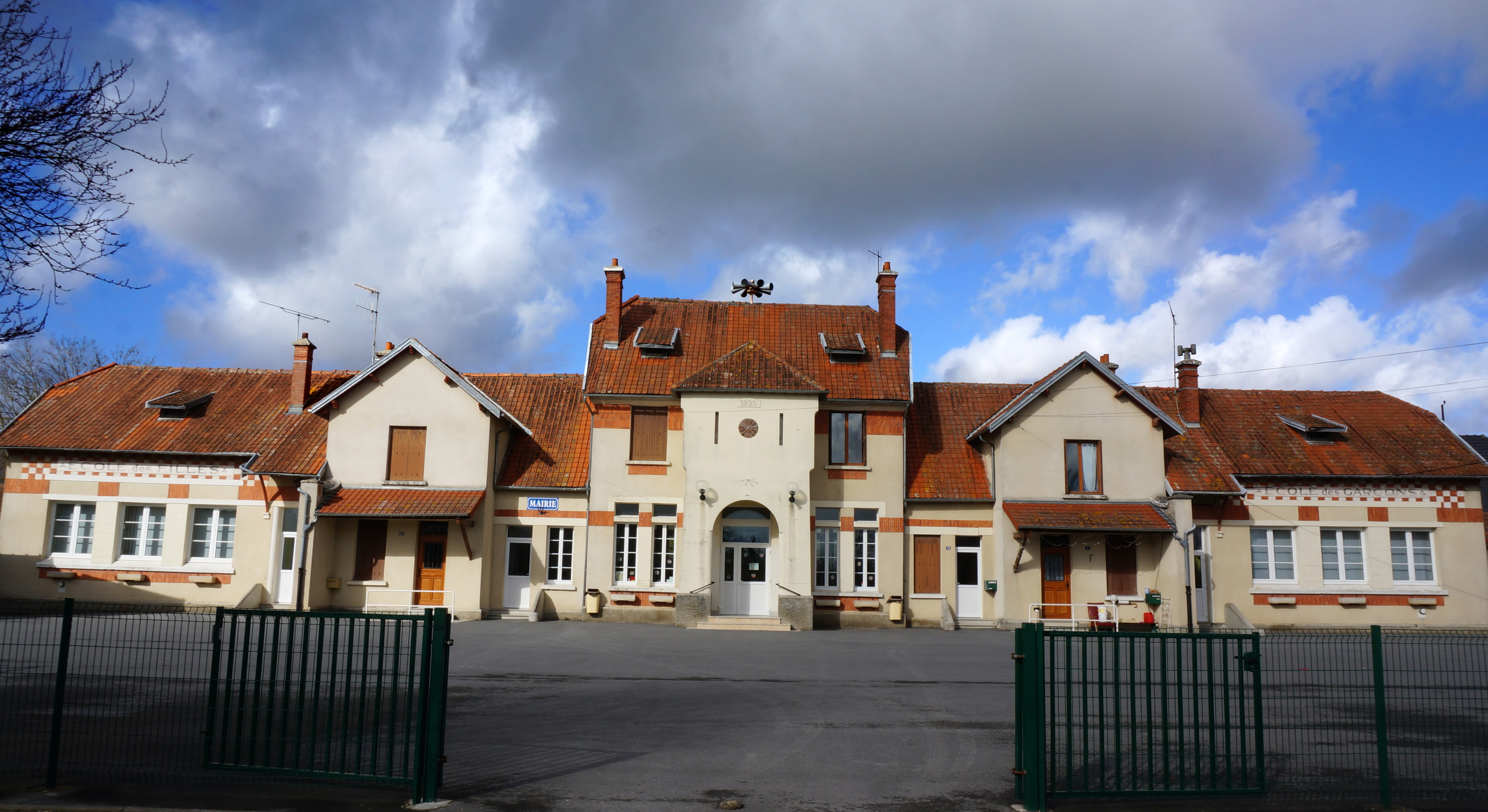 vue de Juvincourt-et-Damary.